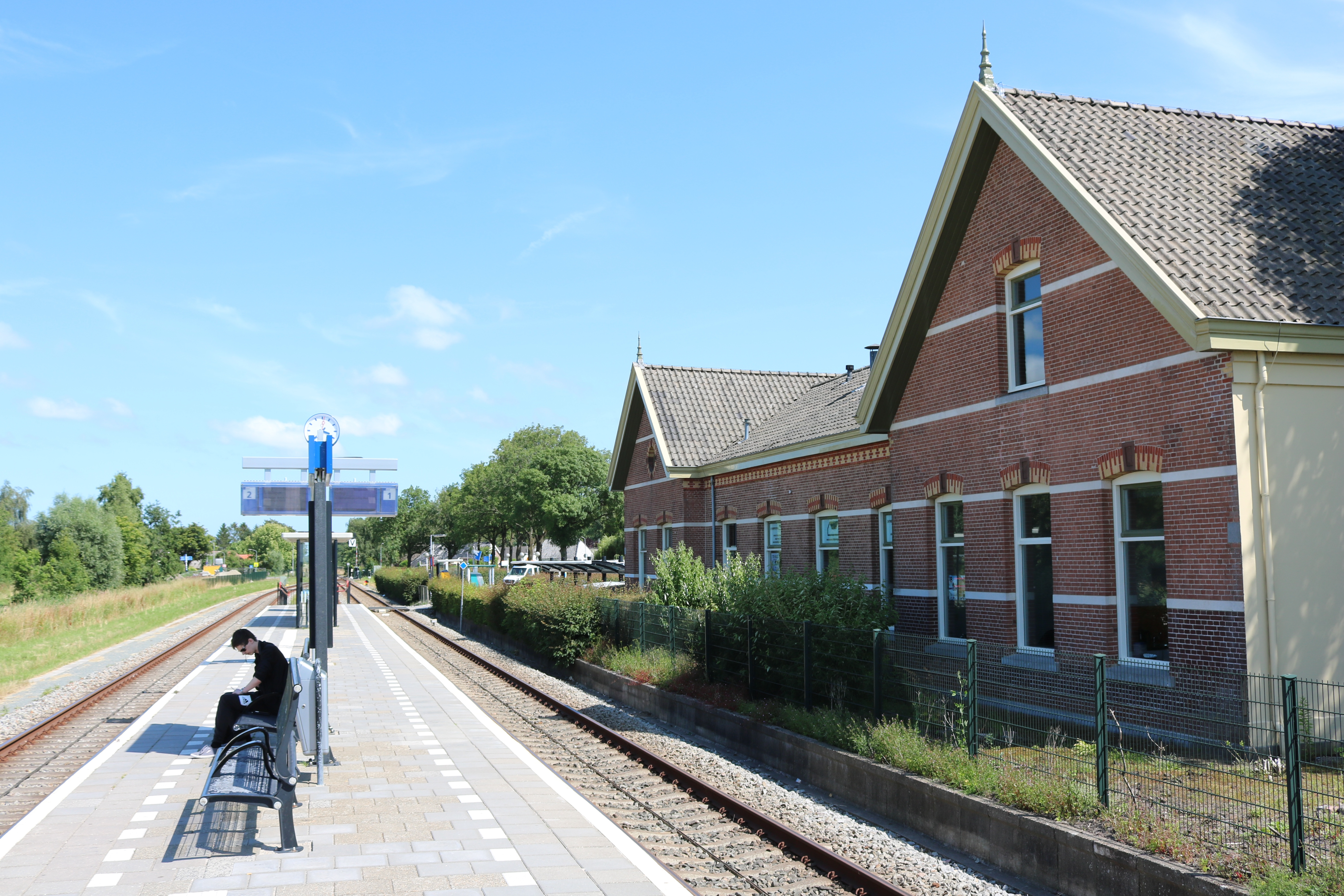 Station Loppersum (foto: Daniel van der Ree, 4 juli 2018)